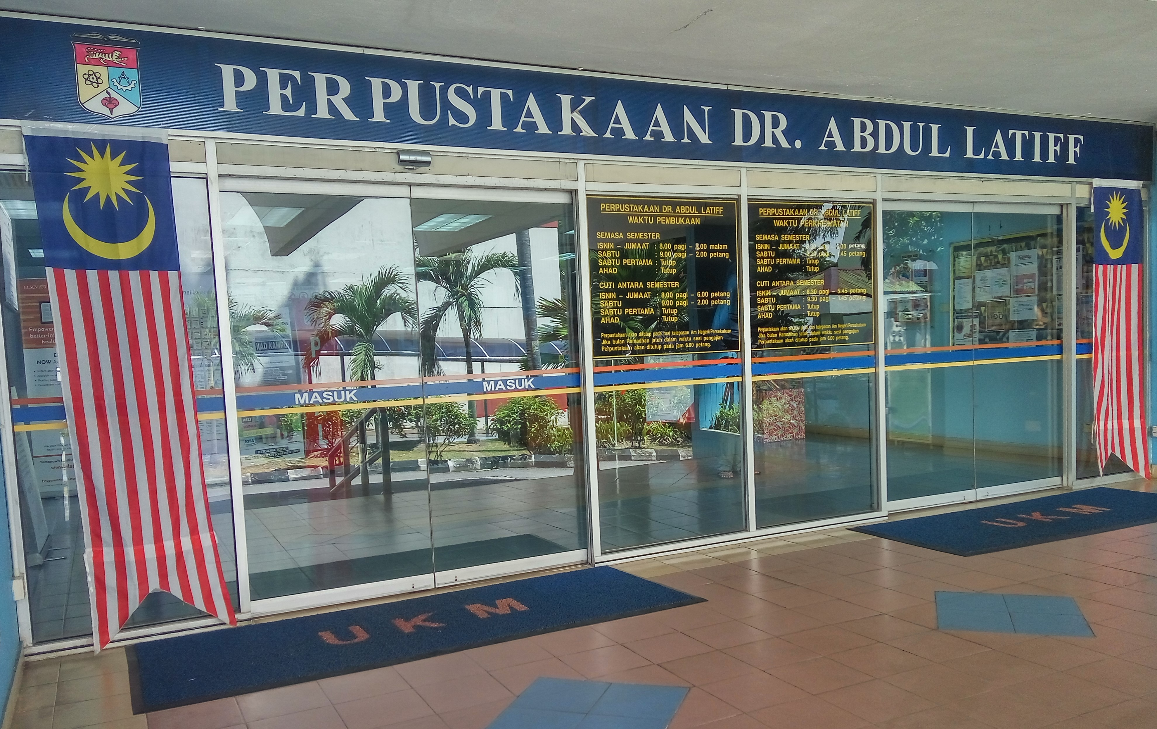 Front